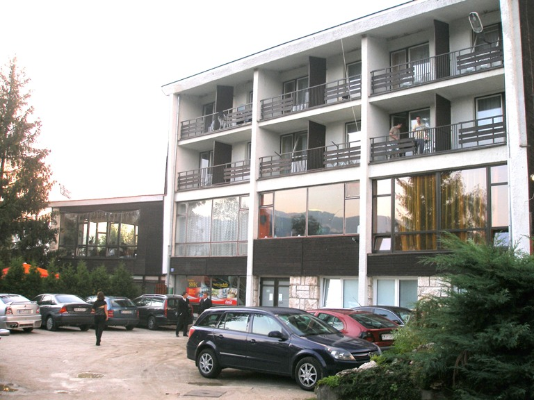 Hotel Sivec, okres Gelnica, región Spiš